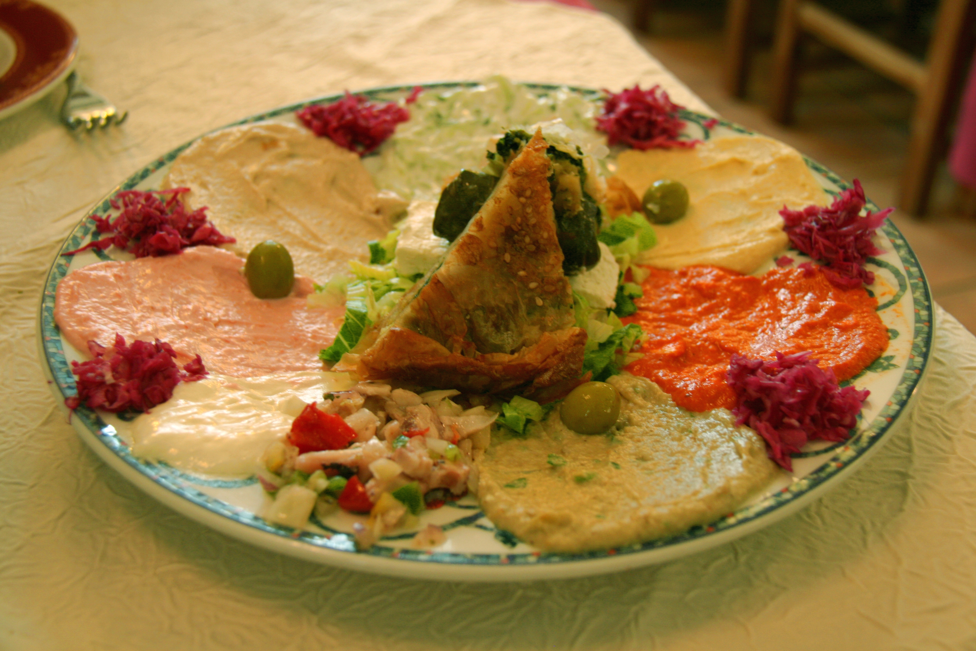 Diferentes salsas griegas: Taramosalata, Tzatziki, etc. (Pikilia)